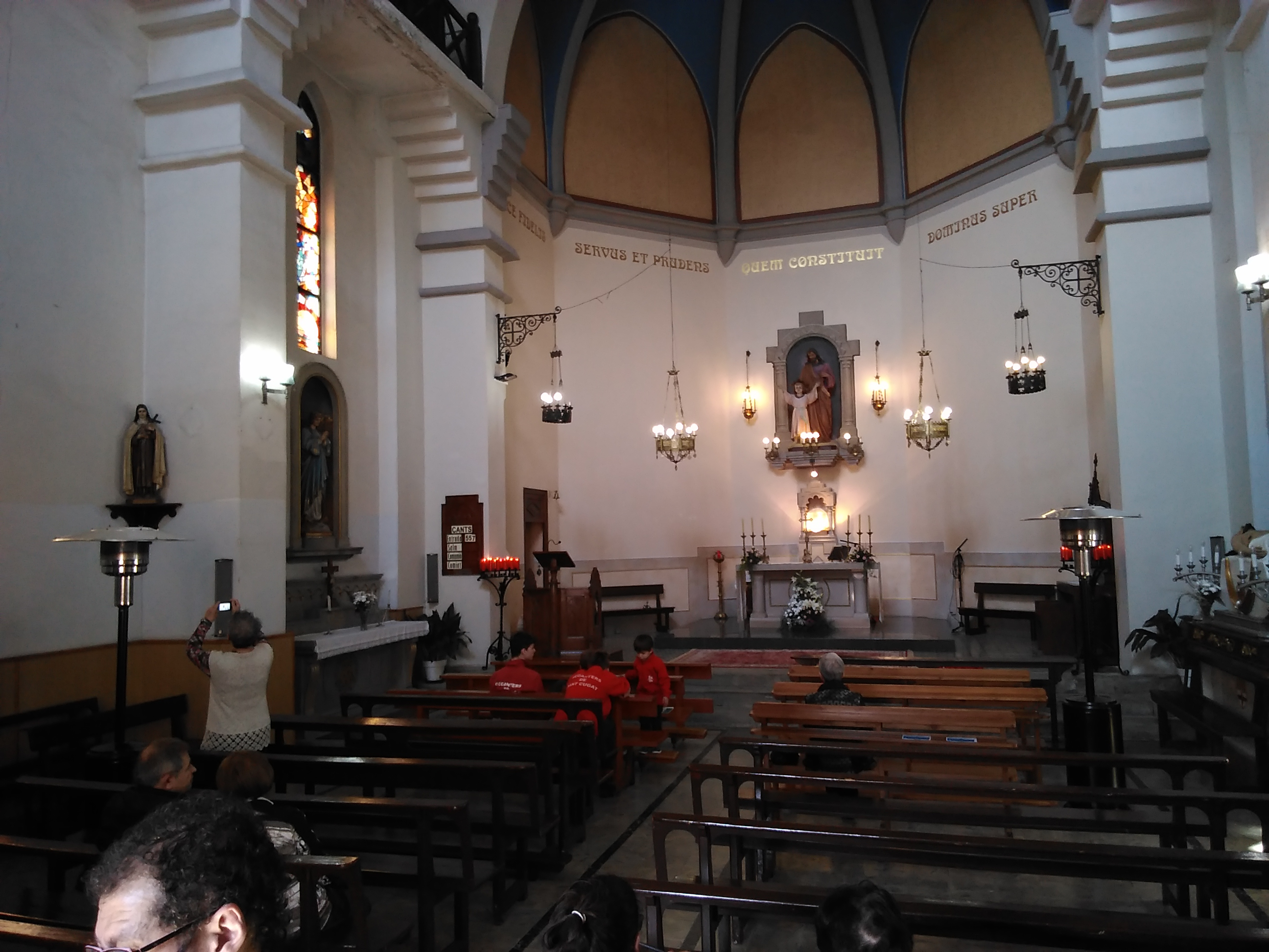 Interior de l'església de Sant Josep del barri del Poblenou (Manresa)